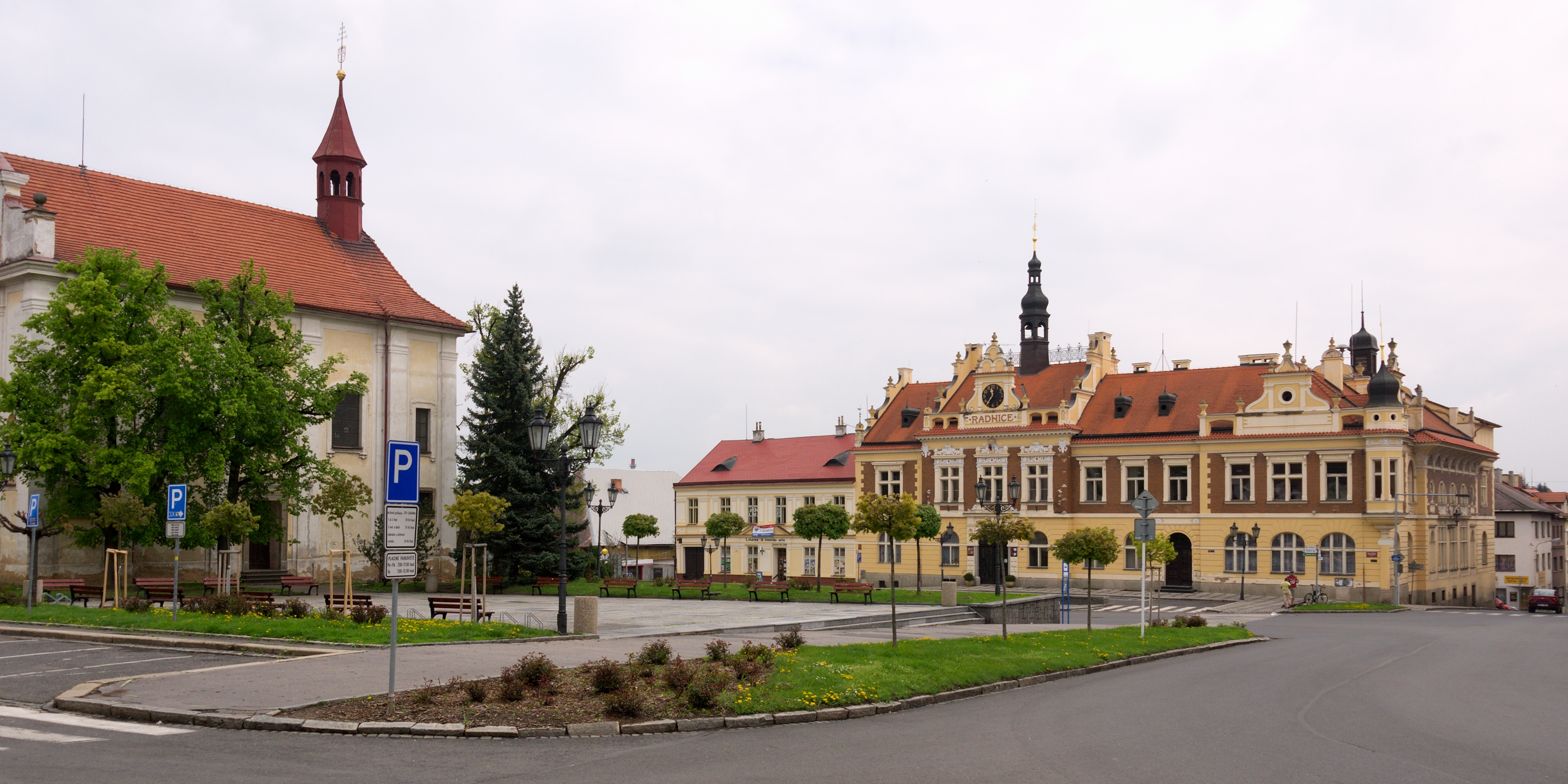 Náměstí Palackého v Hořovicích, vlevo kostel Nejsvětější Trojice, vpravo městská radnice